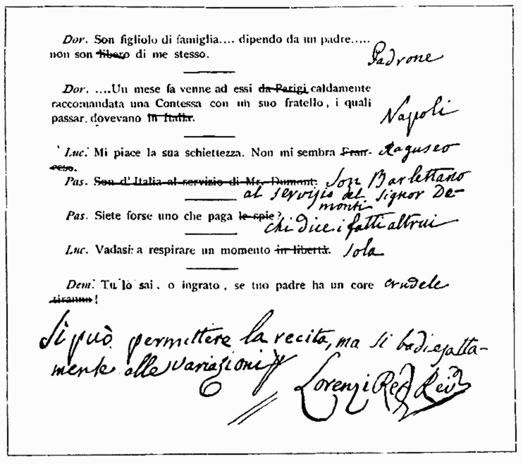 Foglio originale dell'opera "il Brigante di Marsiglia" di Gamerra con le note autografe e le correzione del regio censore G. B. Lorenzi, Pubblicato nel libro a documentazione della mostra sul centenario della repubblica partenopea.